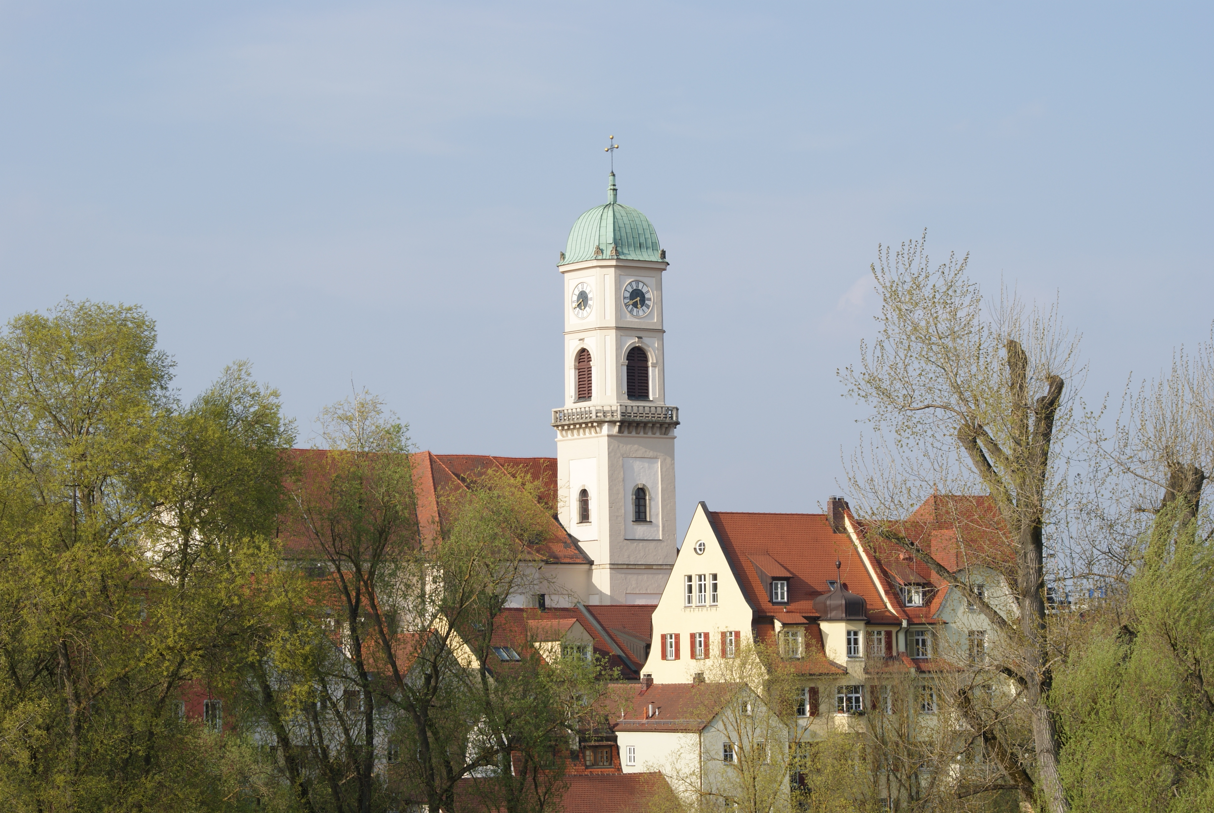 Pfarrkirche St. Andreas und St. Mang, ehemalige Augistinerchorherrenstifskirche in Regensburg-Stadtamhof.1697-1717